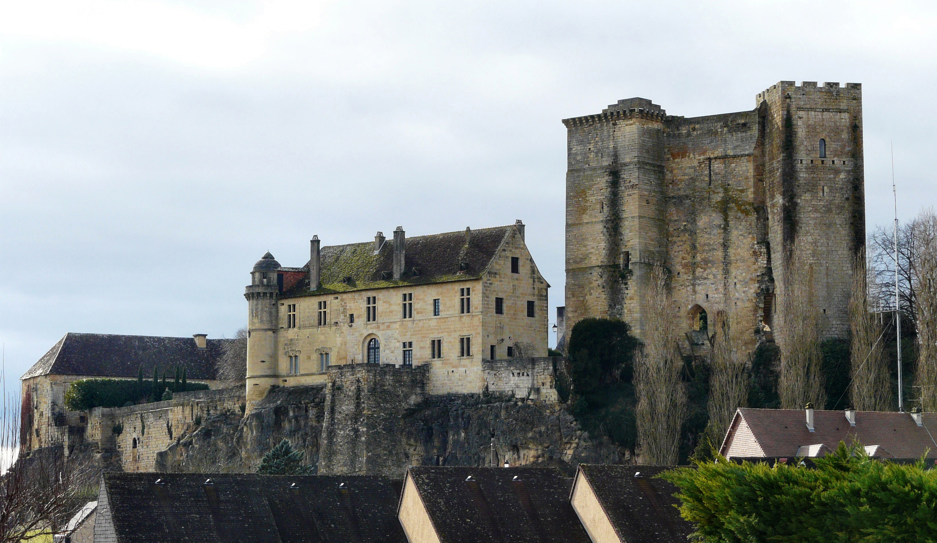 Le logis et le donjon du château d'Excideuil vus du nord-est, Dordogne, France